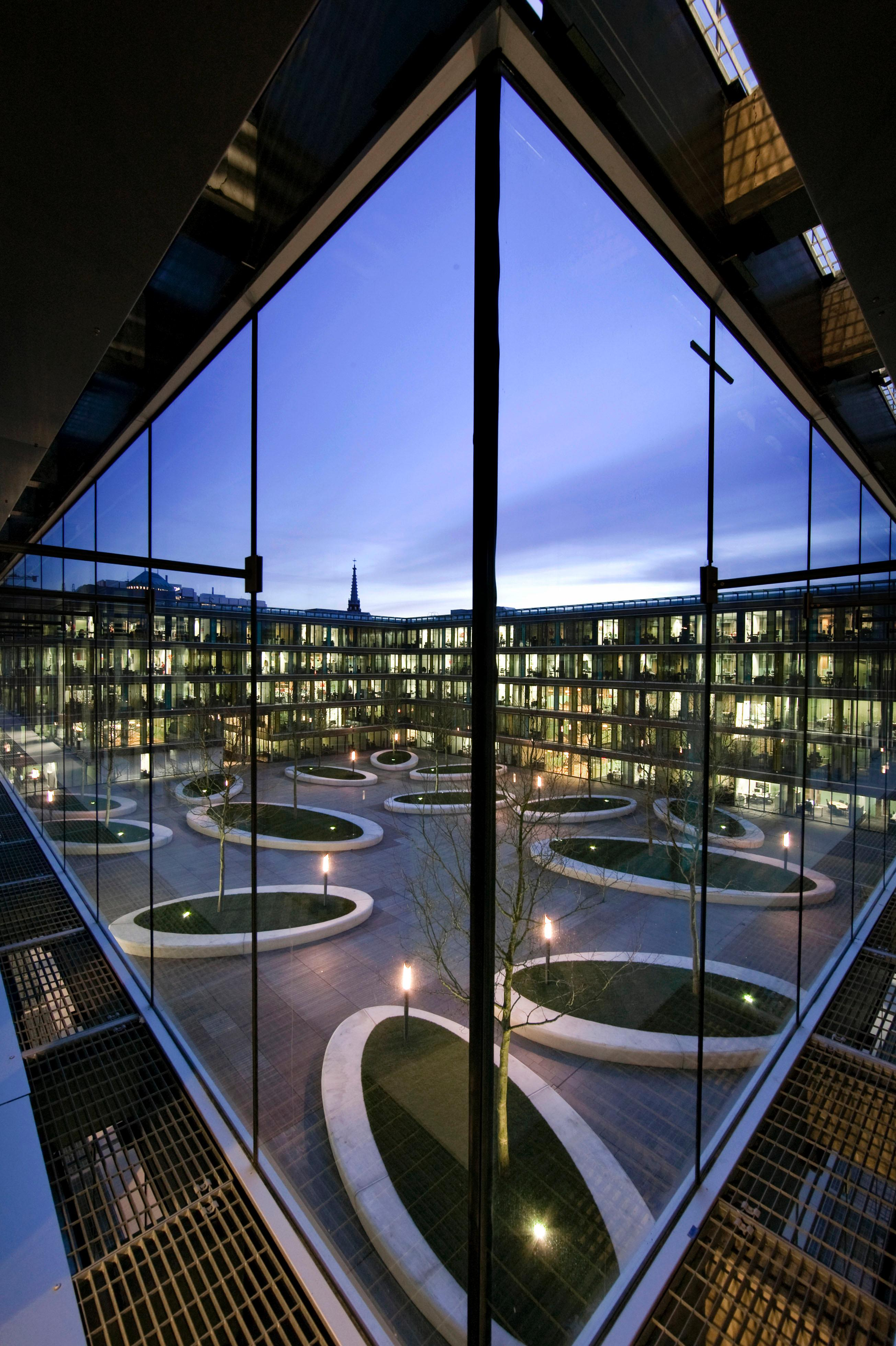 Platanenhof Ministerie van Financiën - na de renovatie.